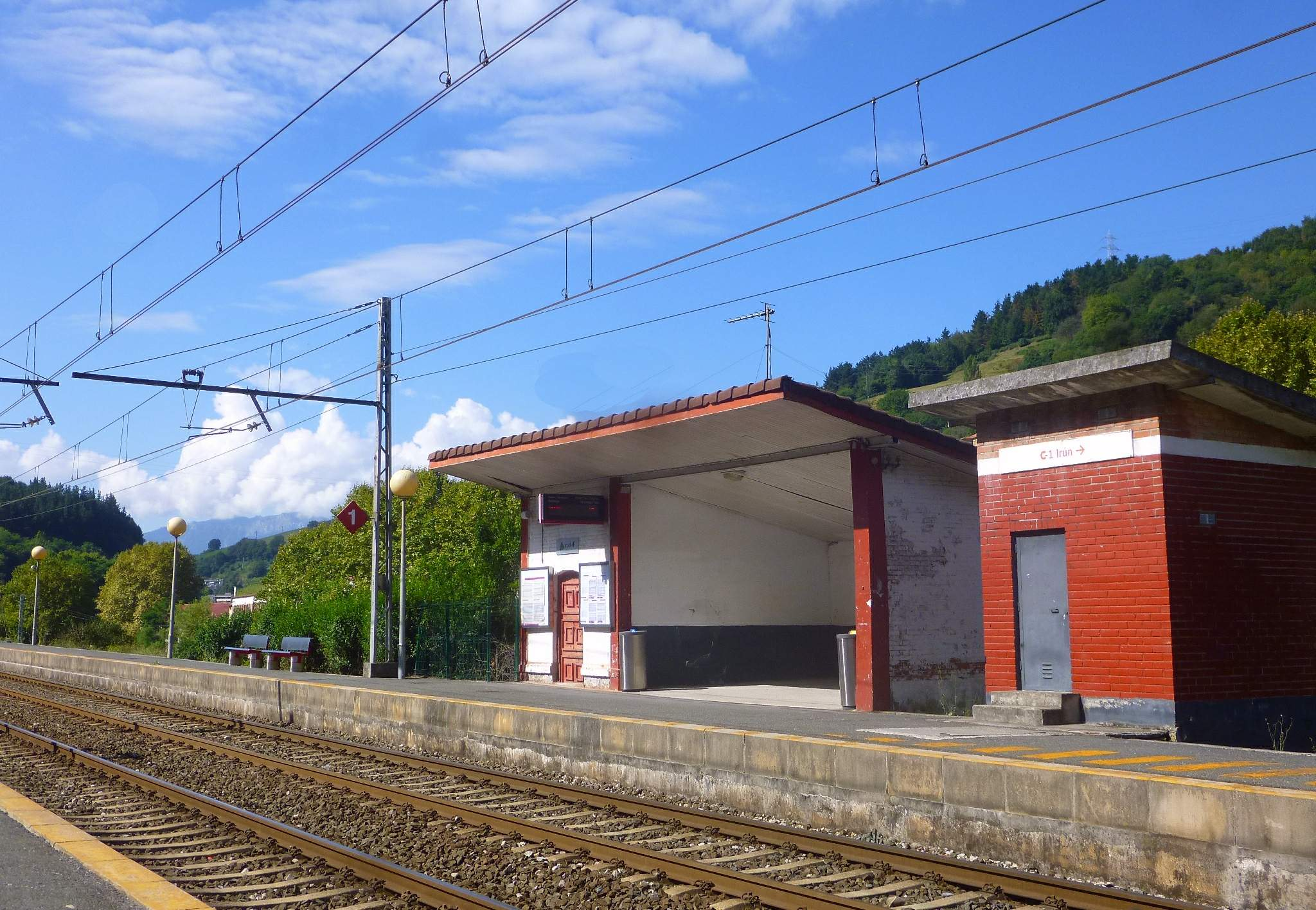 Estación de Itsasondo (Guipúzcoa)